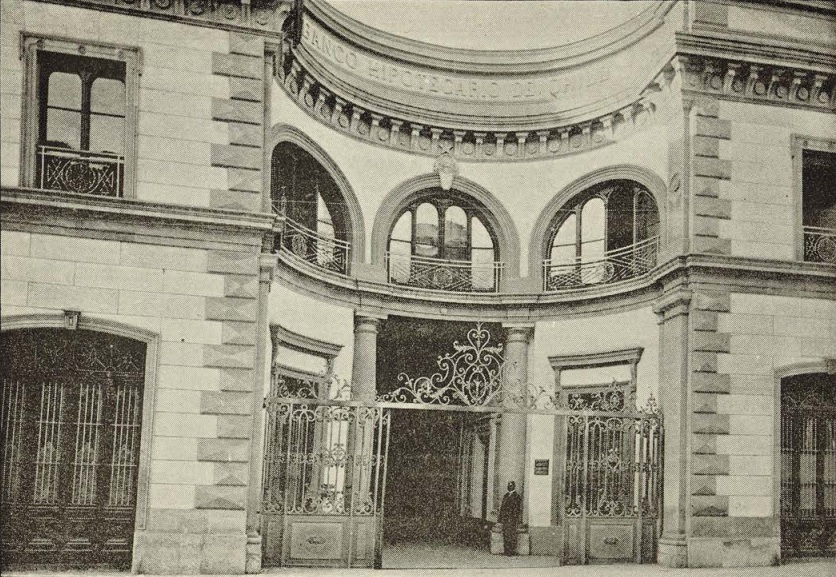 Sede del Banco Hipotecario de Chile en Santiago, ubicado en Huérfanos entre Estado y San Antonio. Posteriormente el edificio fue ocupado por el Teatro Ópera, el Bim Bam Bum, y actualmente es una sucursal del Banco Santander.